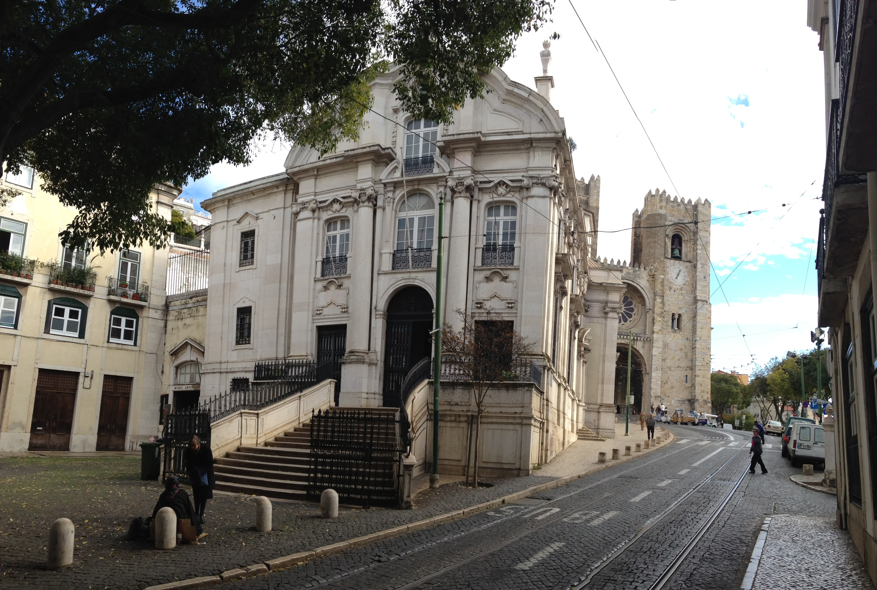 Igreja de Santo Antônio, Lisboa - Portugal